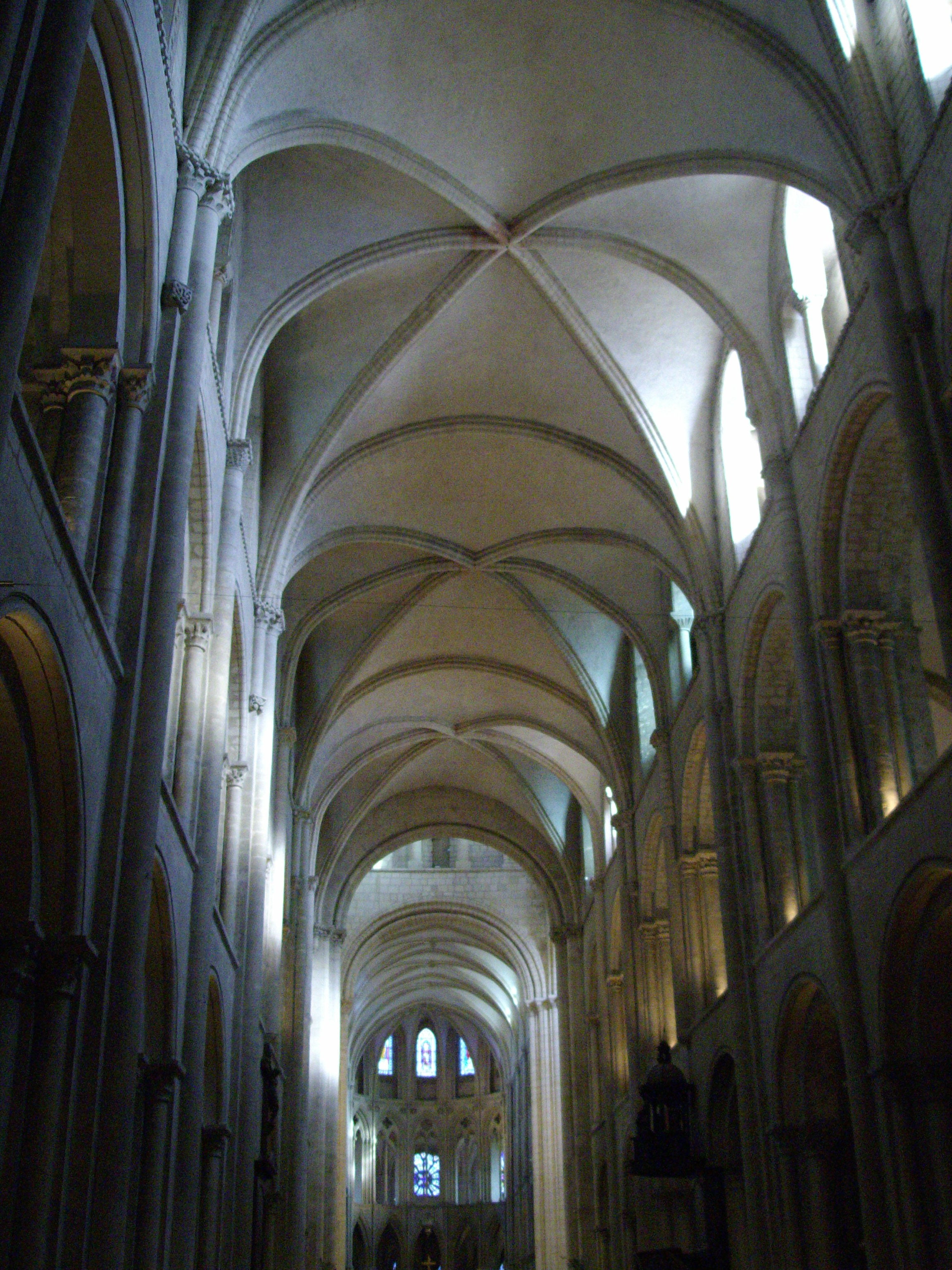 nef de l'église Saint-Étienne de l'ancienne abbaye aux Hommes de Caen (Calvados, Basse-Normandie).